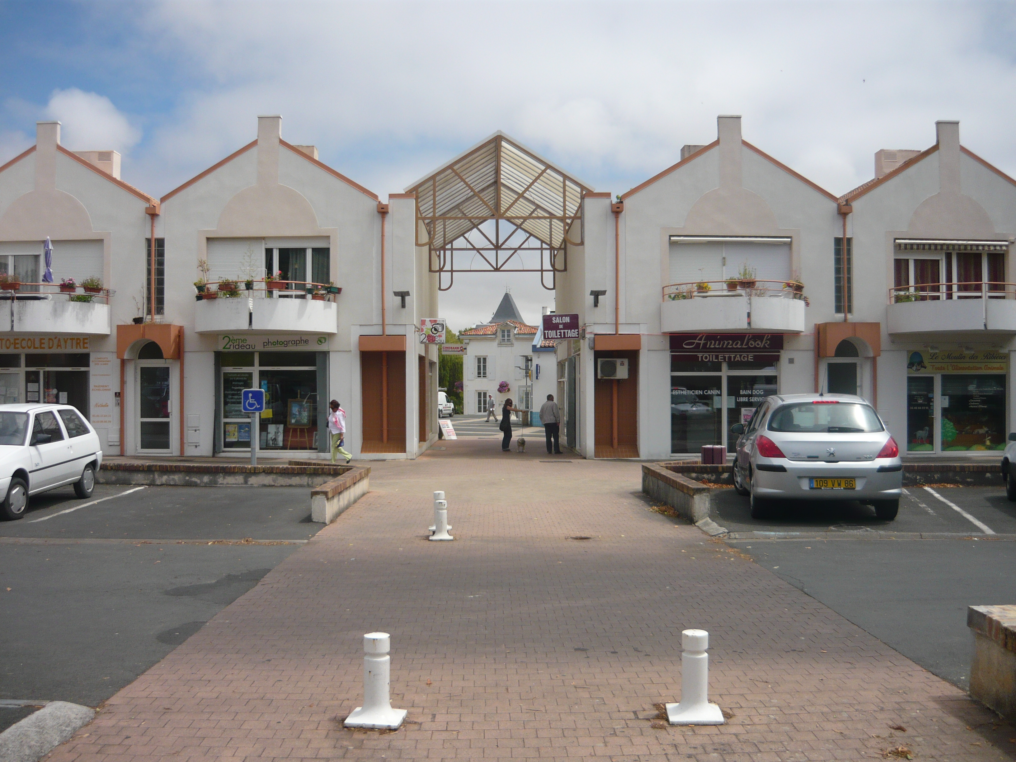 Le centre-ville moderne d'Aytré, ville de la banlieue sud de La Rochelle en Charente-Maritime